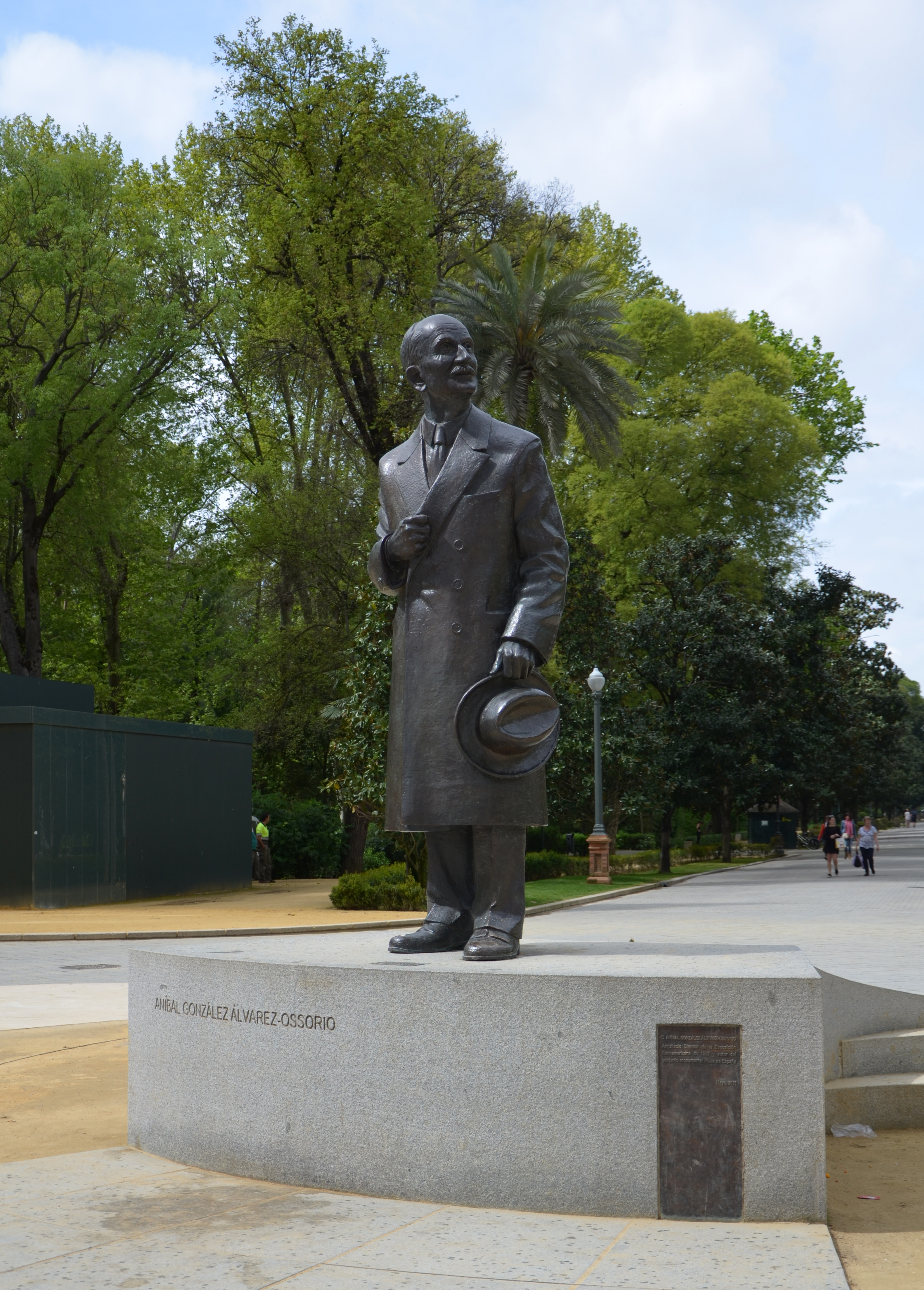 Statue de l'architecte sévillan Aníbal González, placée devant la Place d'Espagne de Séville (Espagne)